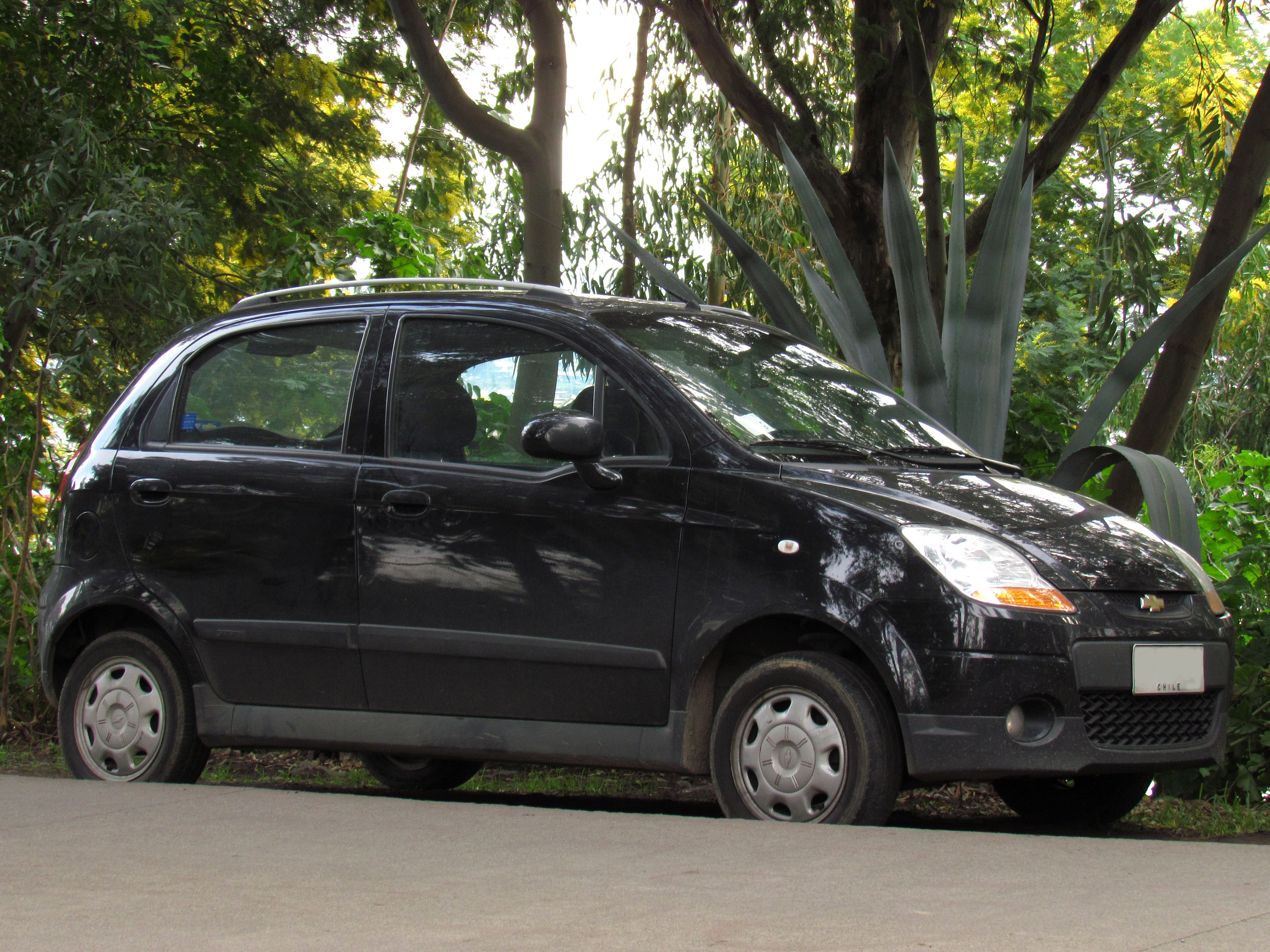 Chevrolet Spark Lite LT 2011